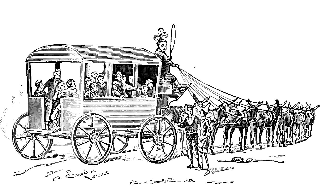 Illustrations from "Le avventure di Pinocchio, storia di un burattino", Carlo Collodi, Bemporad & figlio, Firenze 1902 (Drawings and engravings by Carlo Chiostri, and A. Bongini)